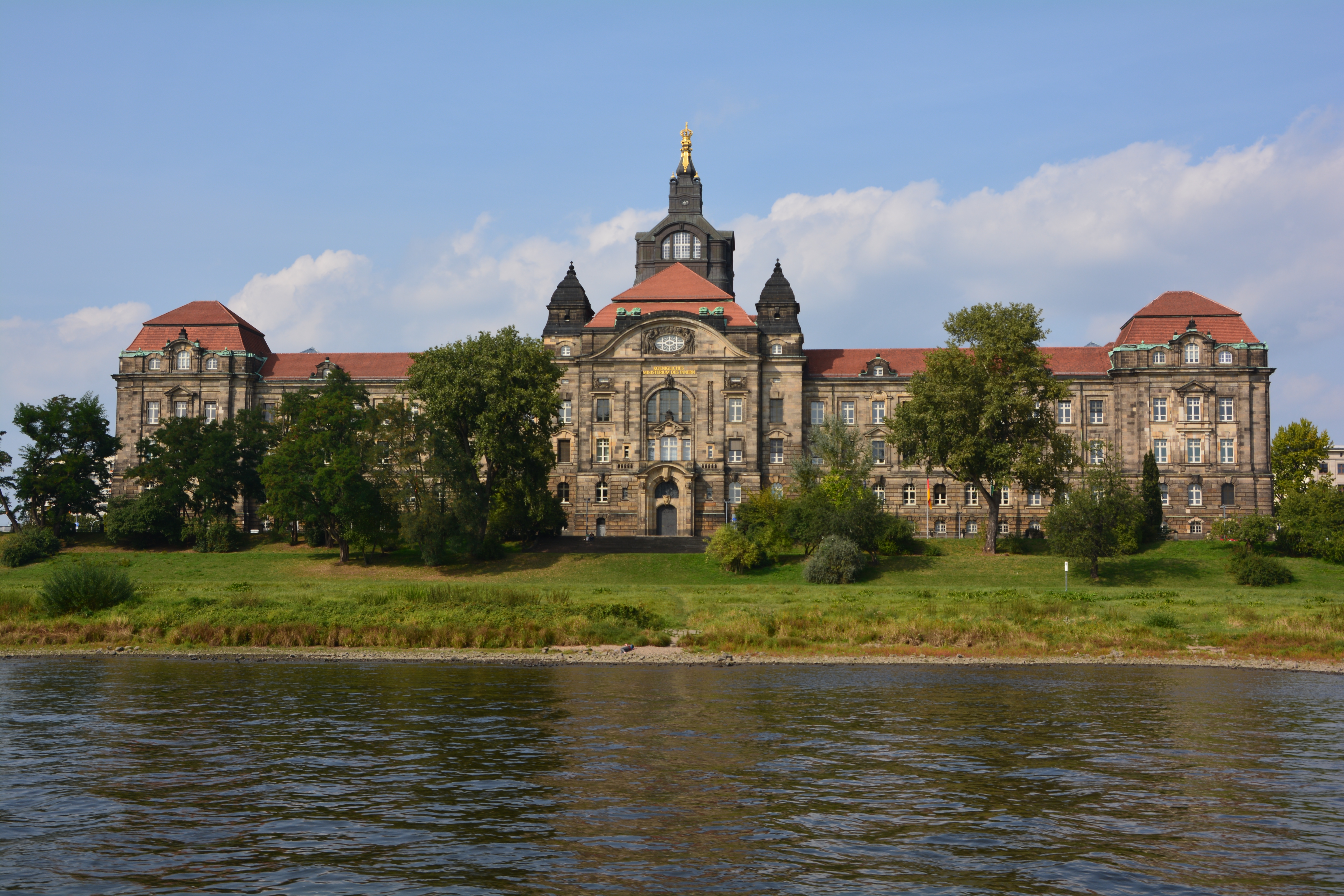 Sächsische Staatskanzlei 2016